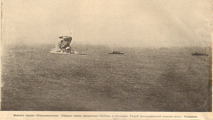 Эскадренный броненосец Петропавловск - взрыв на мине недалеко от крепости Порт-Артур, 31 марта 1904 г. Фото пор.Корсакова (скан из.ж.Искры N13/1914).